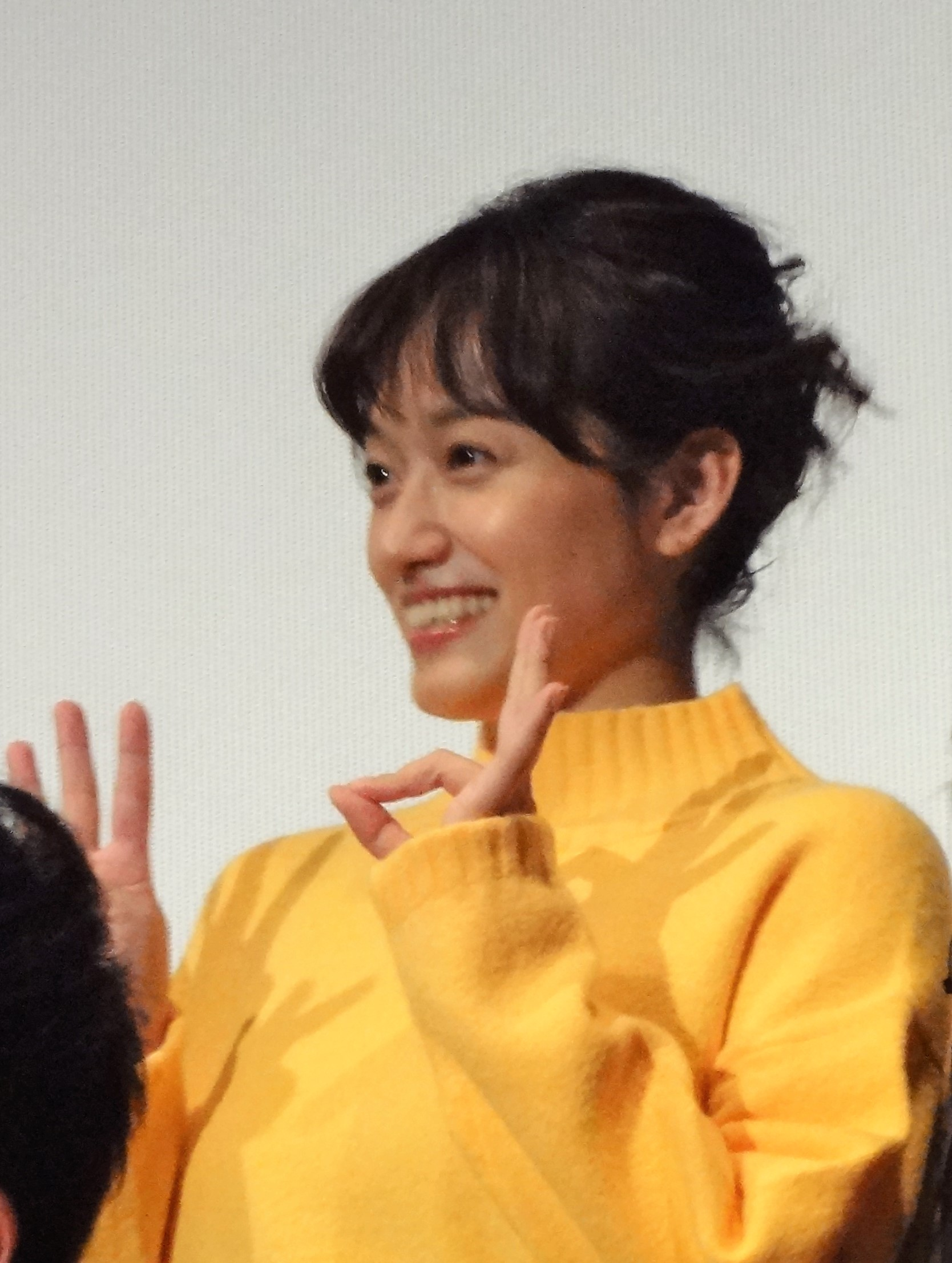 池袋シネマ・ロサにて映画「ミドリムシの夢」の初日舞台挨拶に登壇する落ち目のアイドル・みう役の戸田昌宏